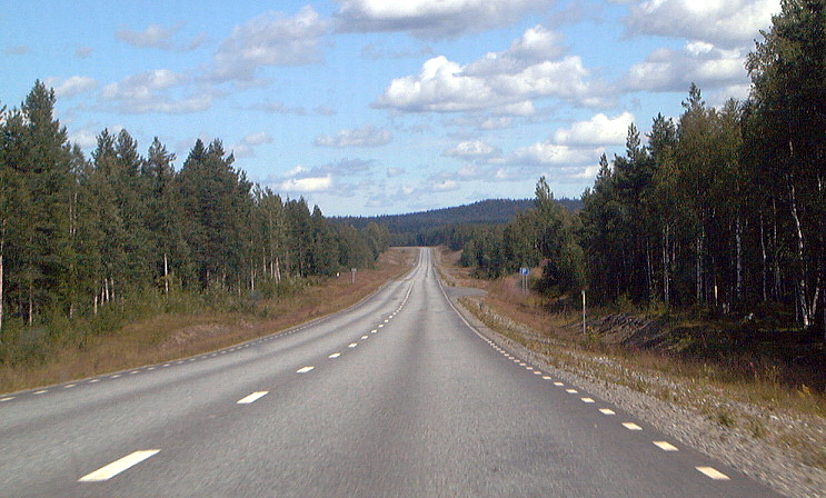 Bildbeschreibung: Inlandsvägen Fotograf/Zeichner: Inlandsvägen Datum: August 2005